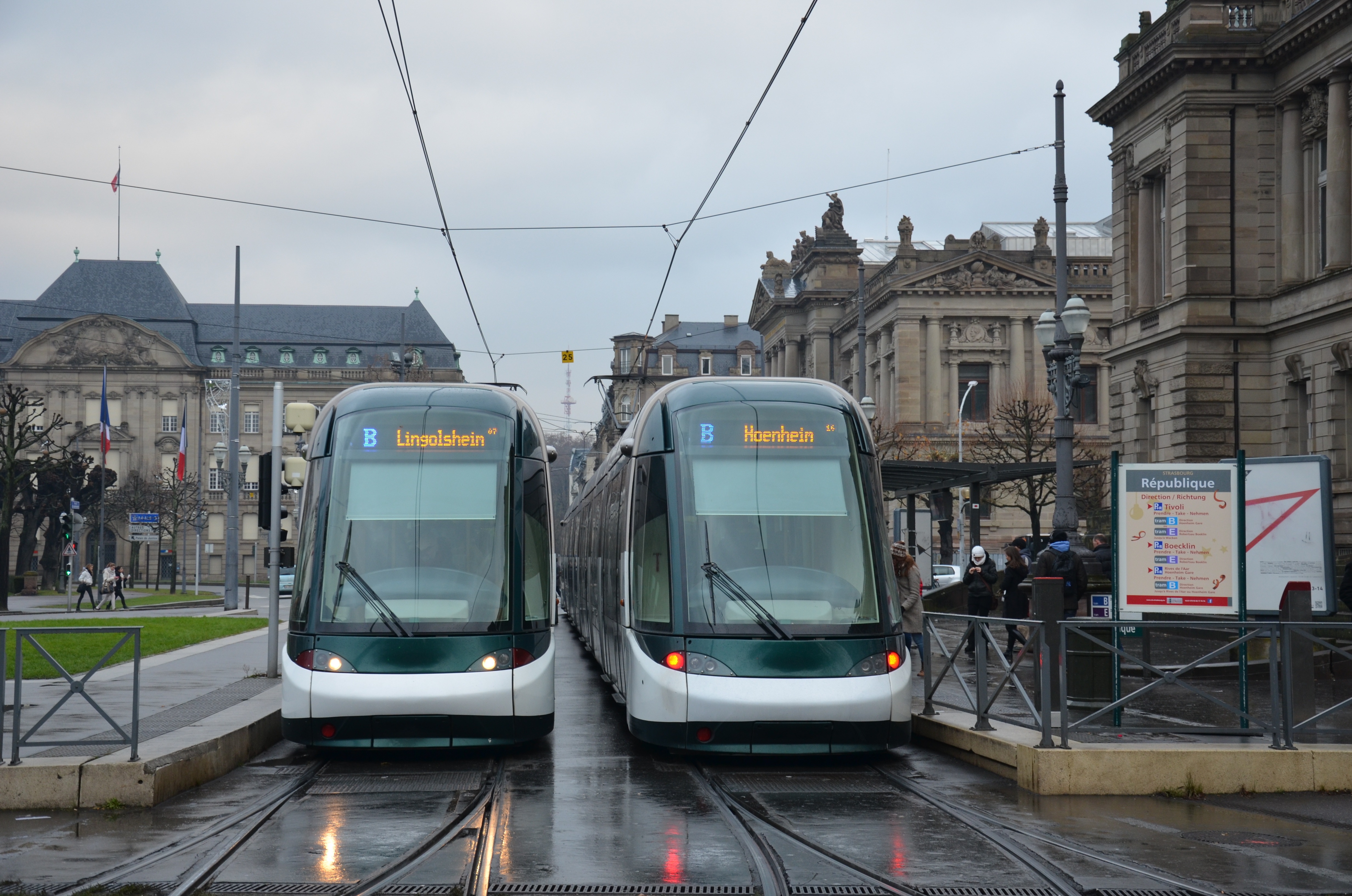 Alstom Citadis 403 n°2022 et 2032 sur la ligne B du réseau CTS de Strasbourg, à la station République.